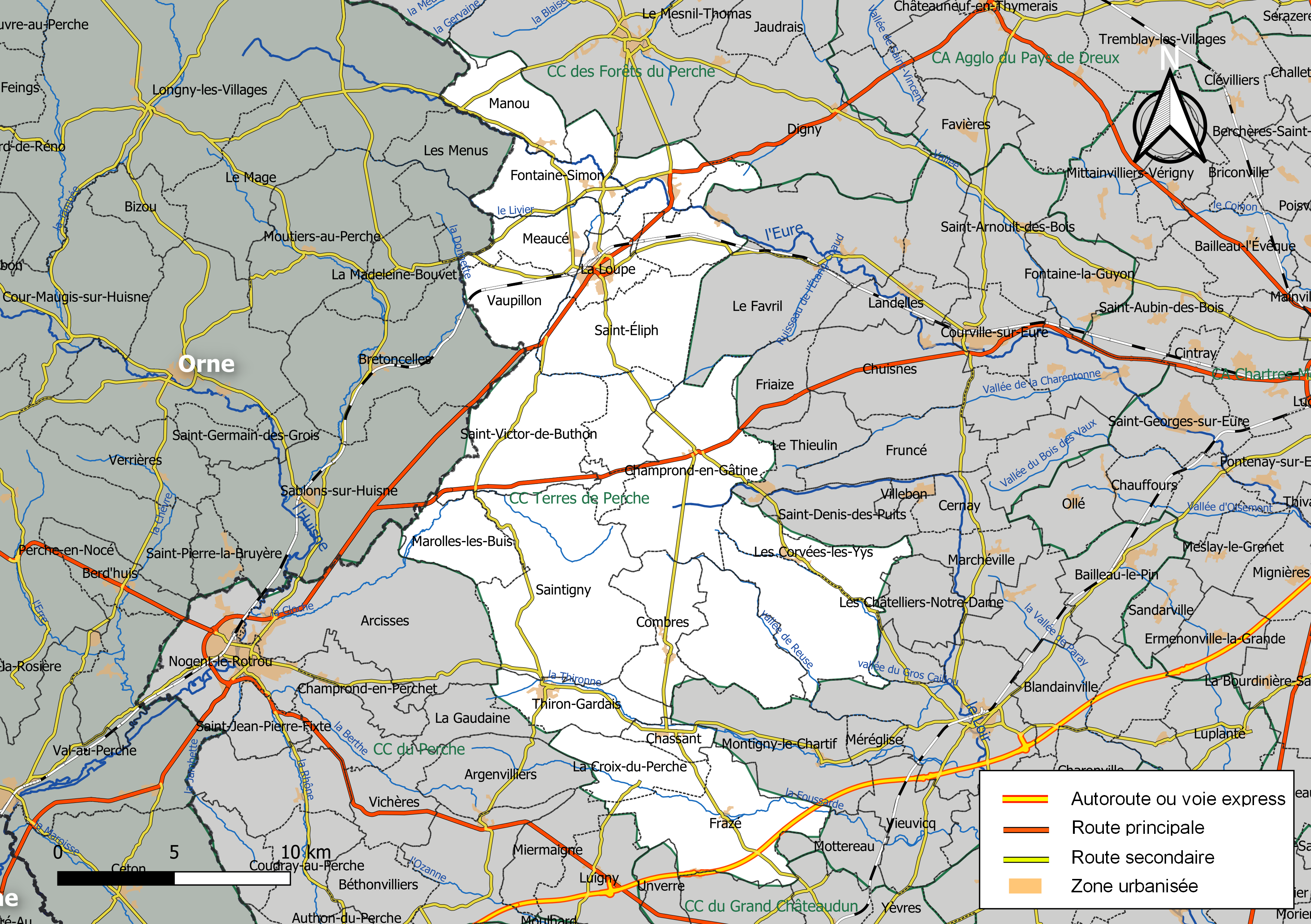 Carte géographique de la communauté de communes Terres de Perche, département d'Eure-et-Loir, France. Composition au 1er janvier 2019.